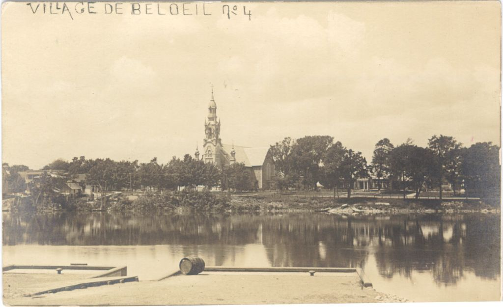 Village de Beloeil, carte postale